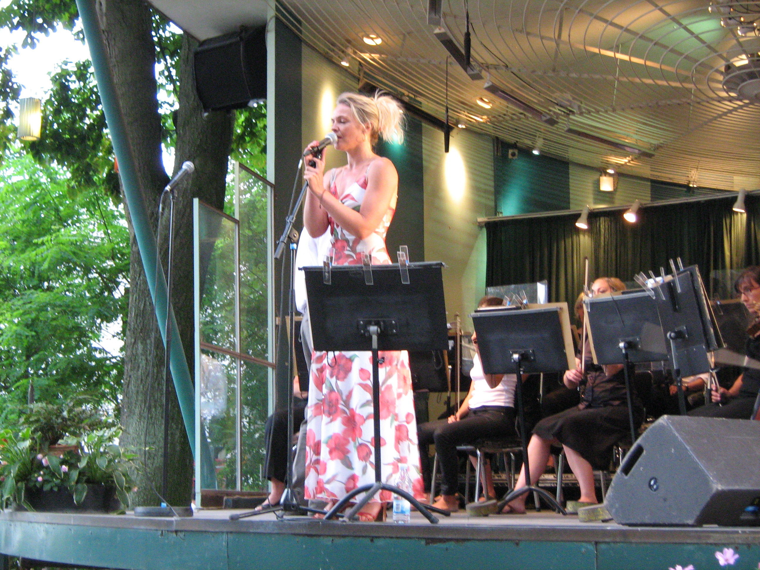 Trine Pallesen og Promenadeorkestret i Tivoli, København. 9. august 2009.